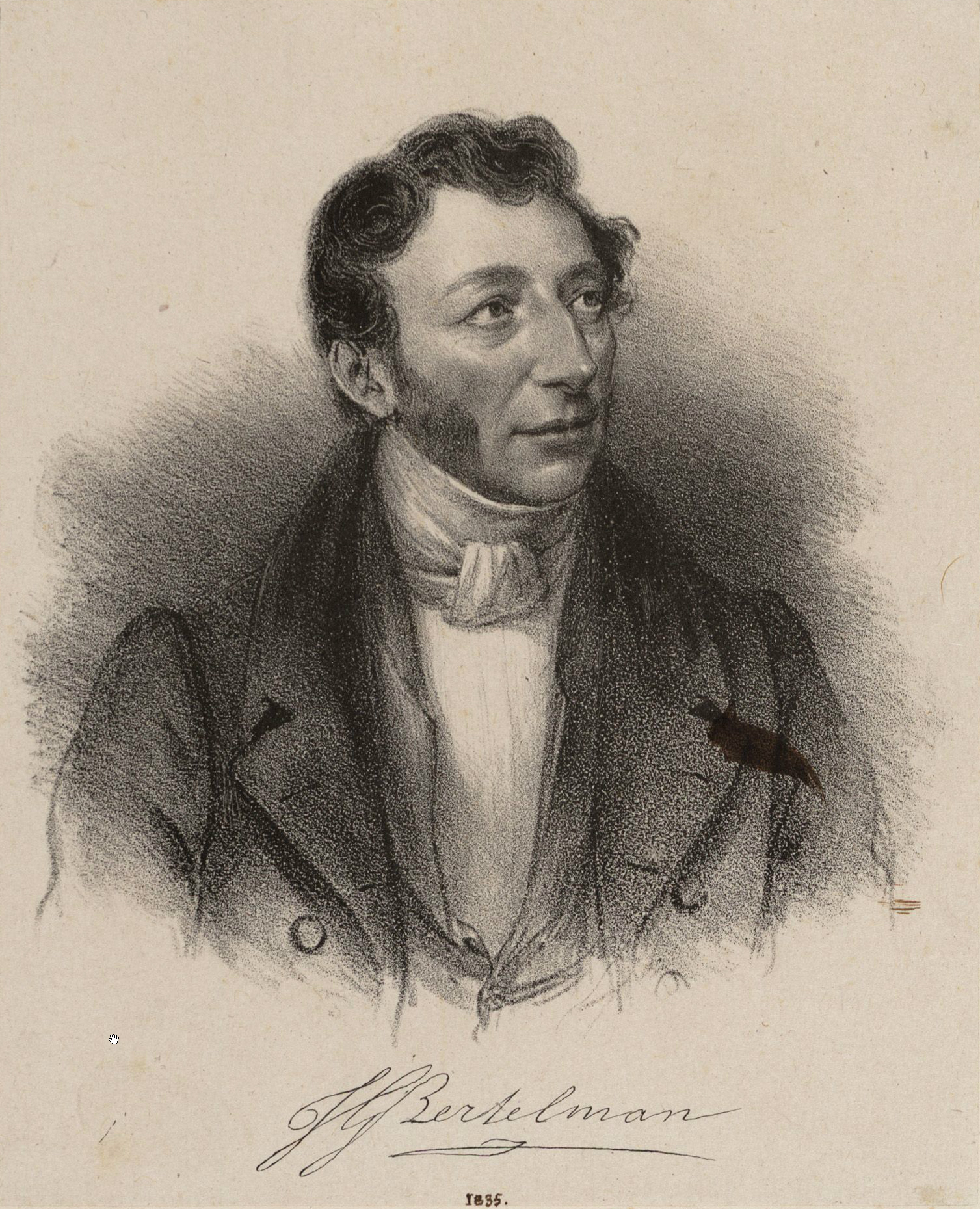 Portret van de componist Jan George Bertelman (1782-1854)